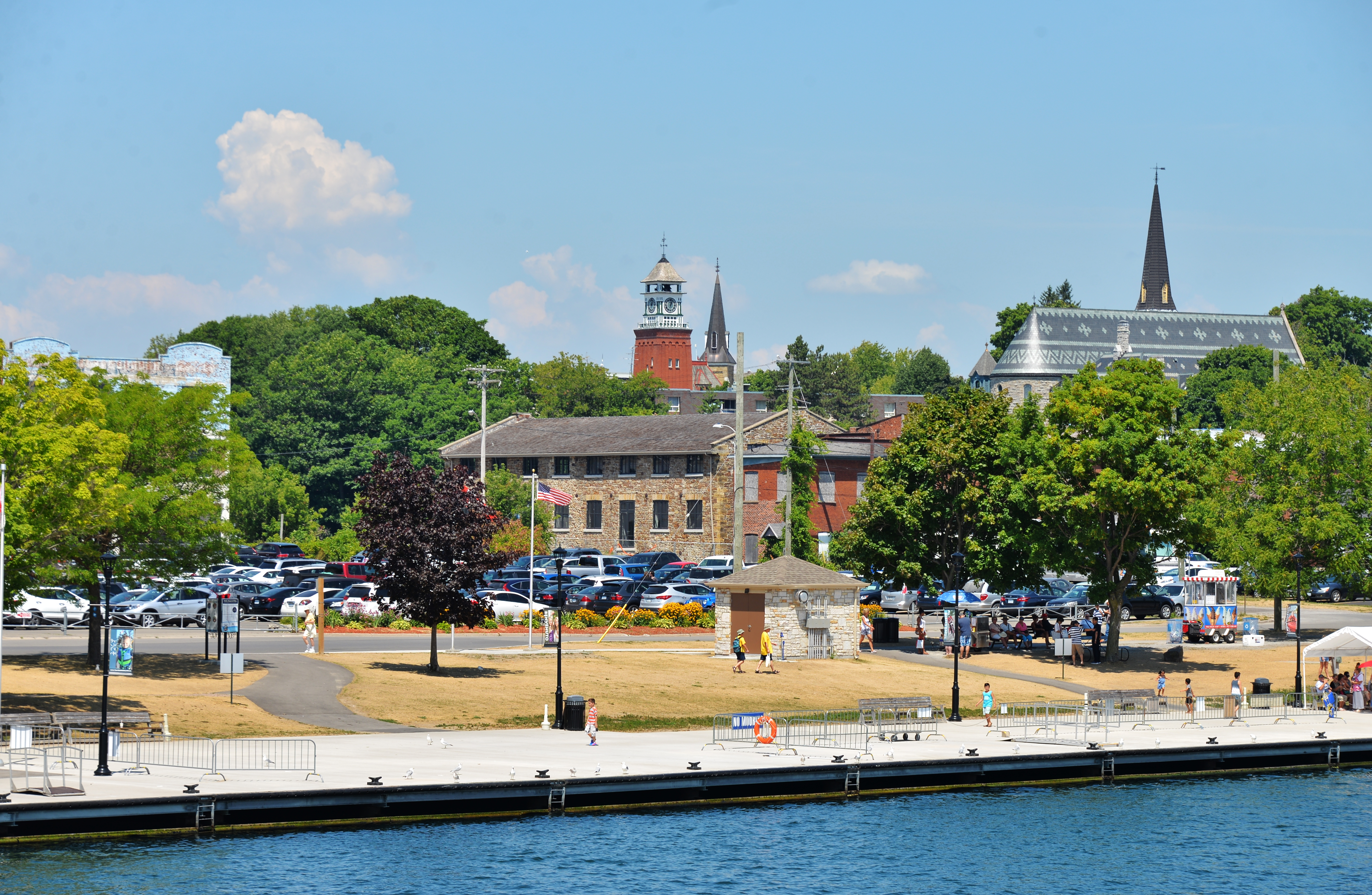 Пристань Ґананокве, обертовий міст та набережна на фоні споруд центральної частини міста